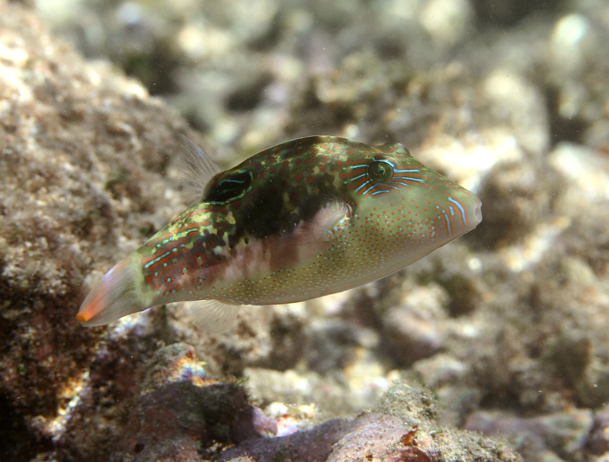 Une bourse de sable (Canthigaster bennetti) à la Réunion.